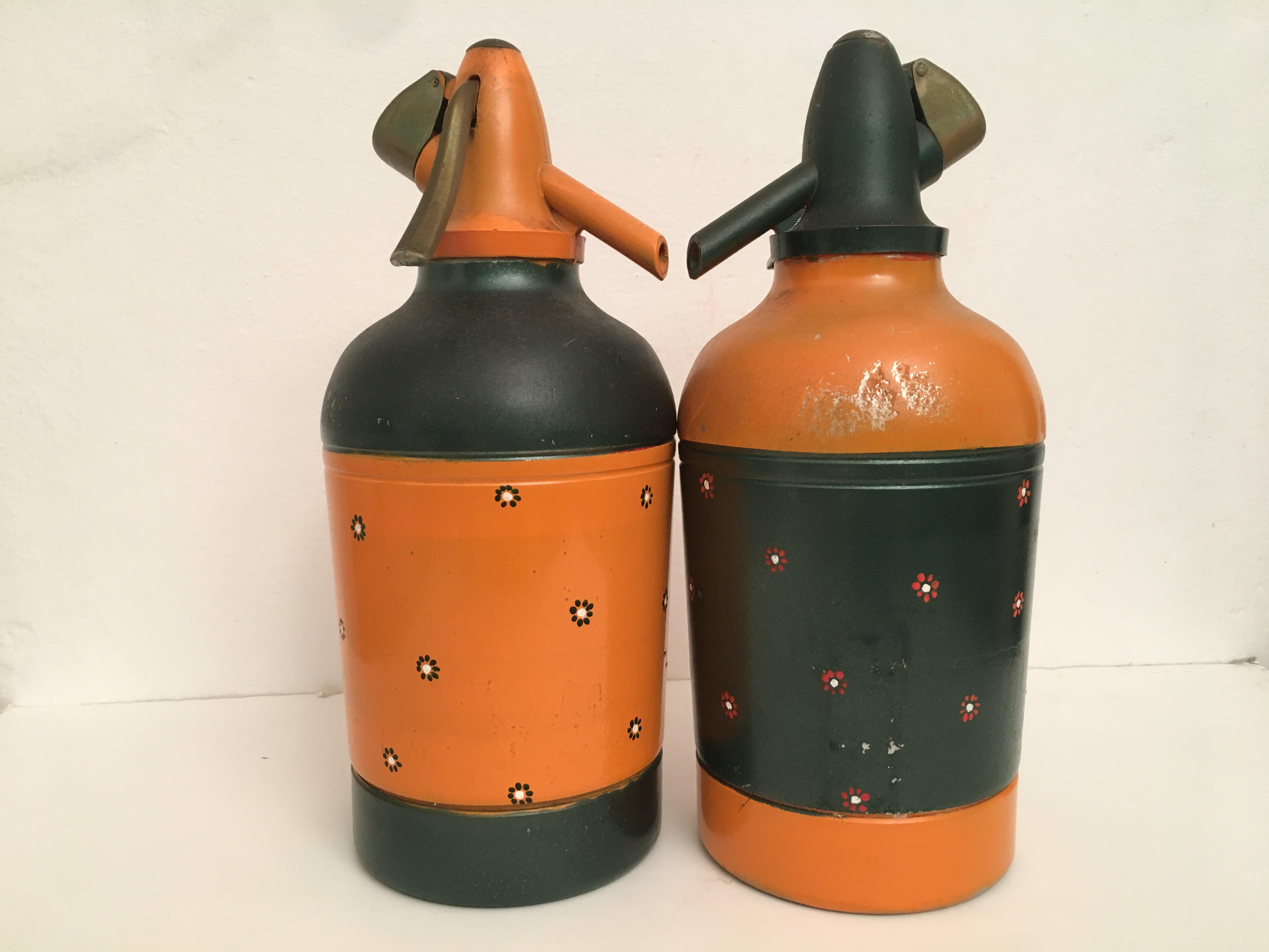 זוג בקבוקי סיפולוקס, מאוסף ארבל לוי